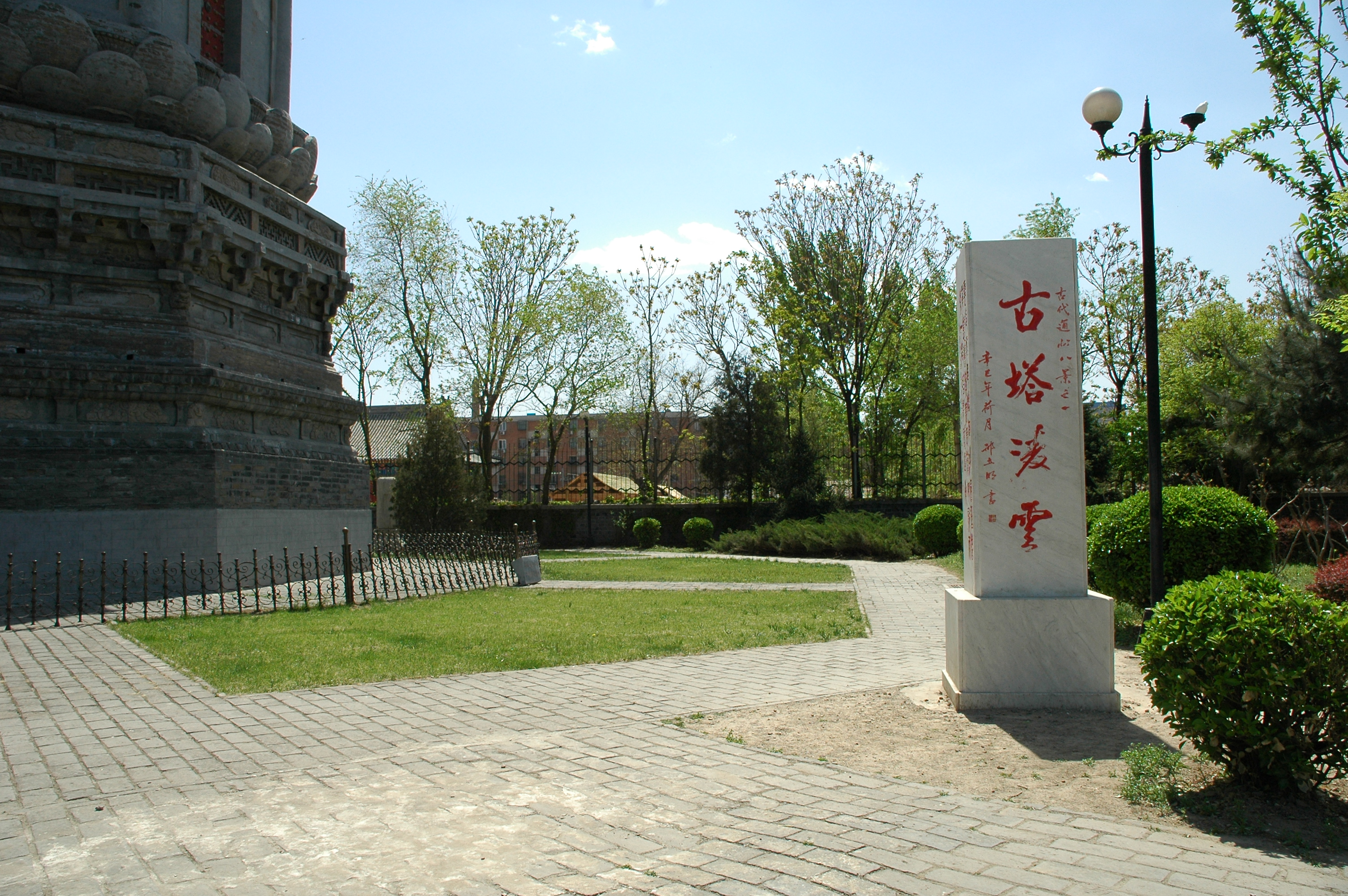 中文（中国大陆）: 燃灯塔－古塔凌云碑